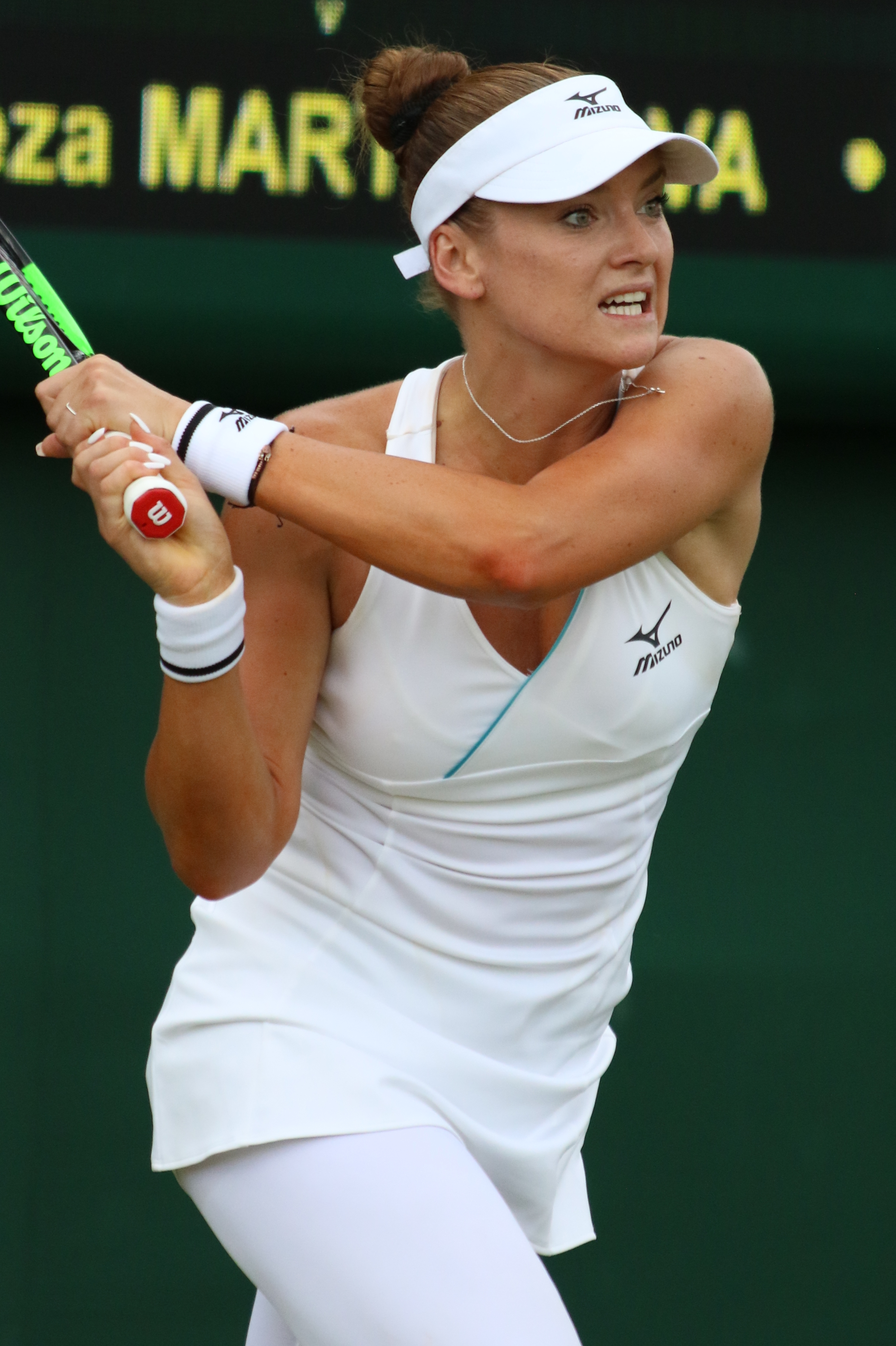 Martincova WM19 (17)